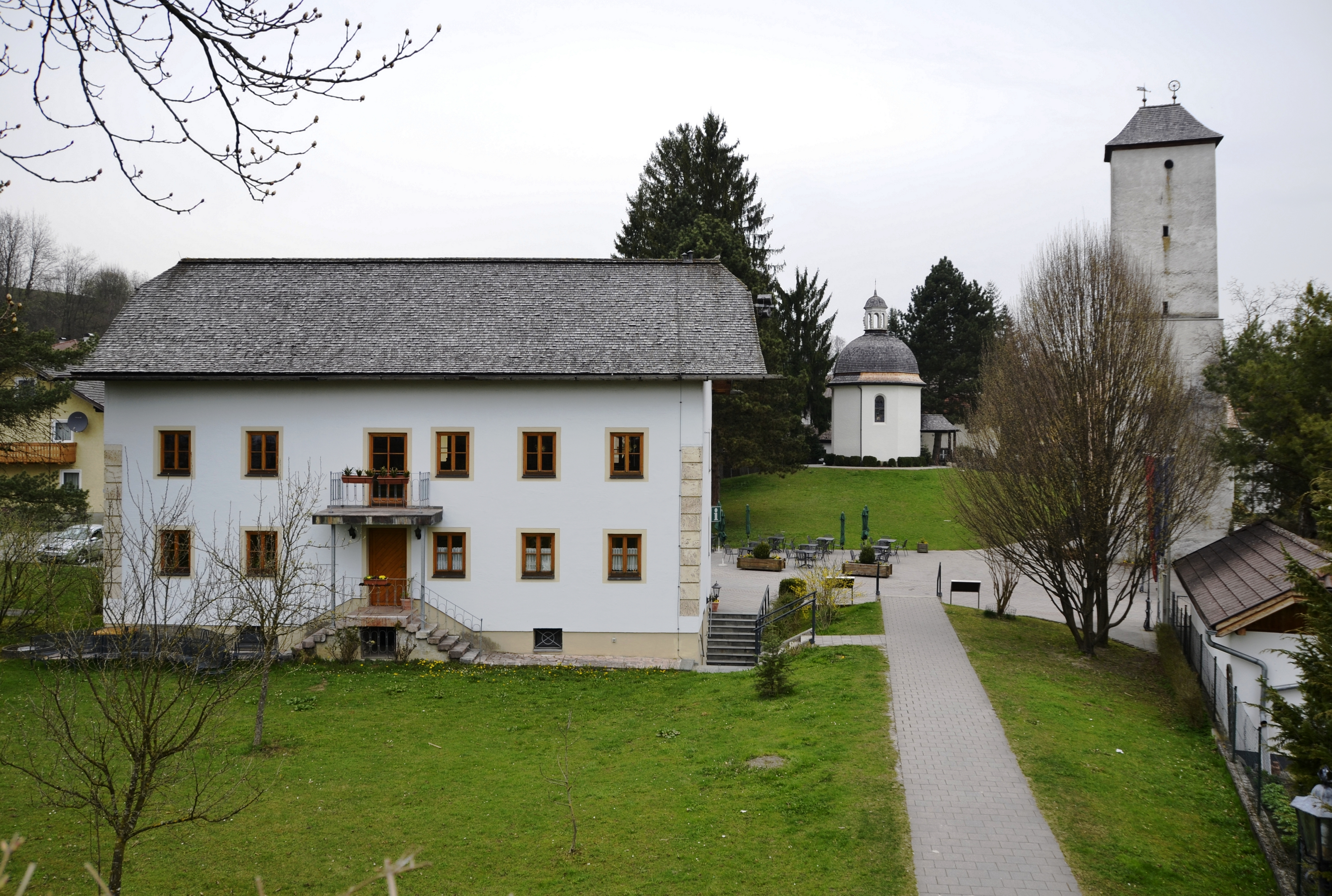 Das Heimatmuseum Oberndorf bei Salzburg.